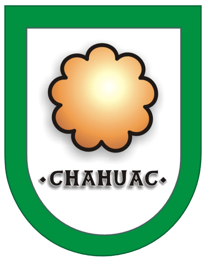 Glifo de la colonia Cháhuac, Domingo Arenas, Puebla.